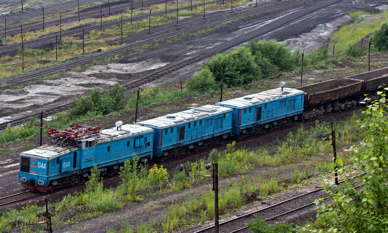 Тяговый агрегат (электротепловоз) ОПЭ1А-044. Михайловский ГОК